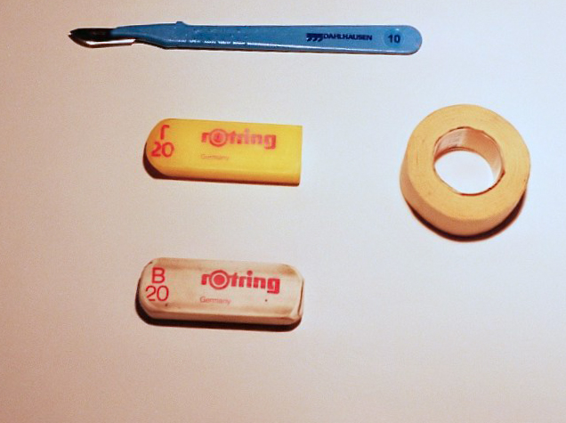 Diverse Radiergummis und Radierhilfen, Fixierstreifen zum Befestigen technischer Zeichnungen auf dem Reißbrett